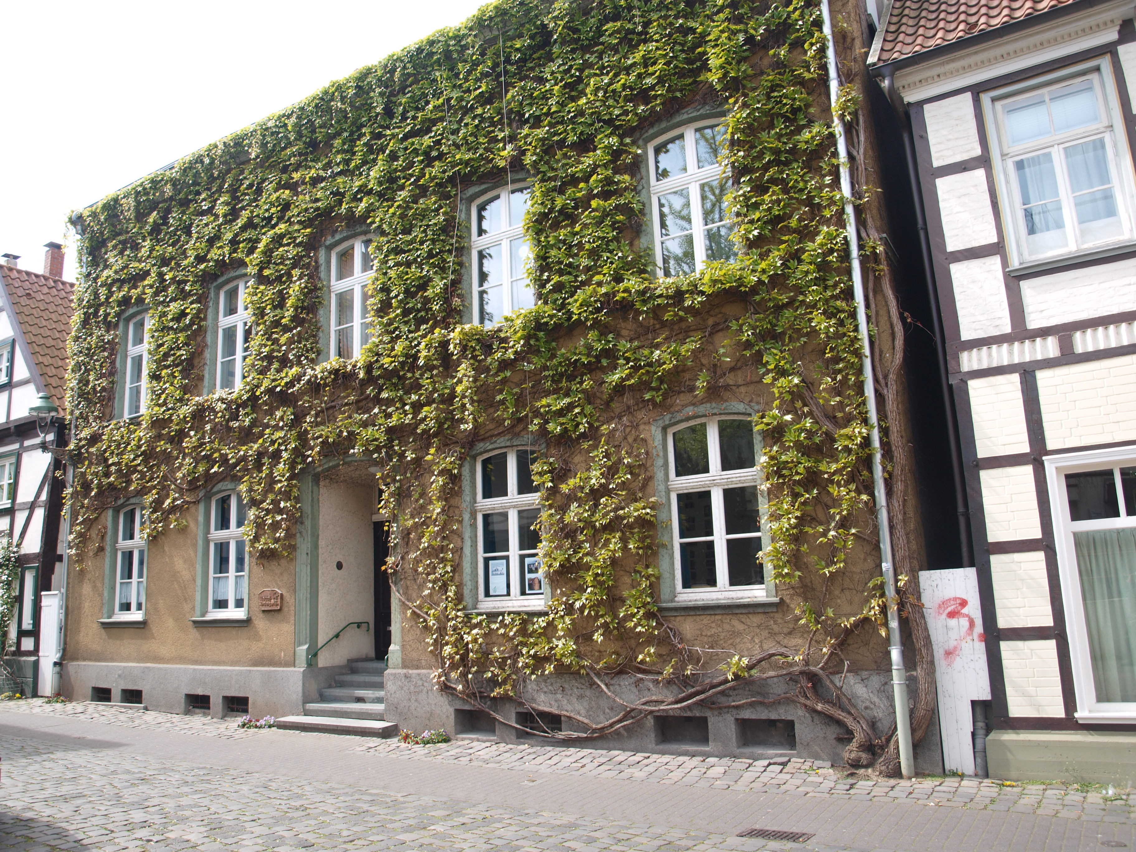 Stolpersteinlage Soest Kohlbrink 7